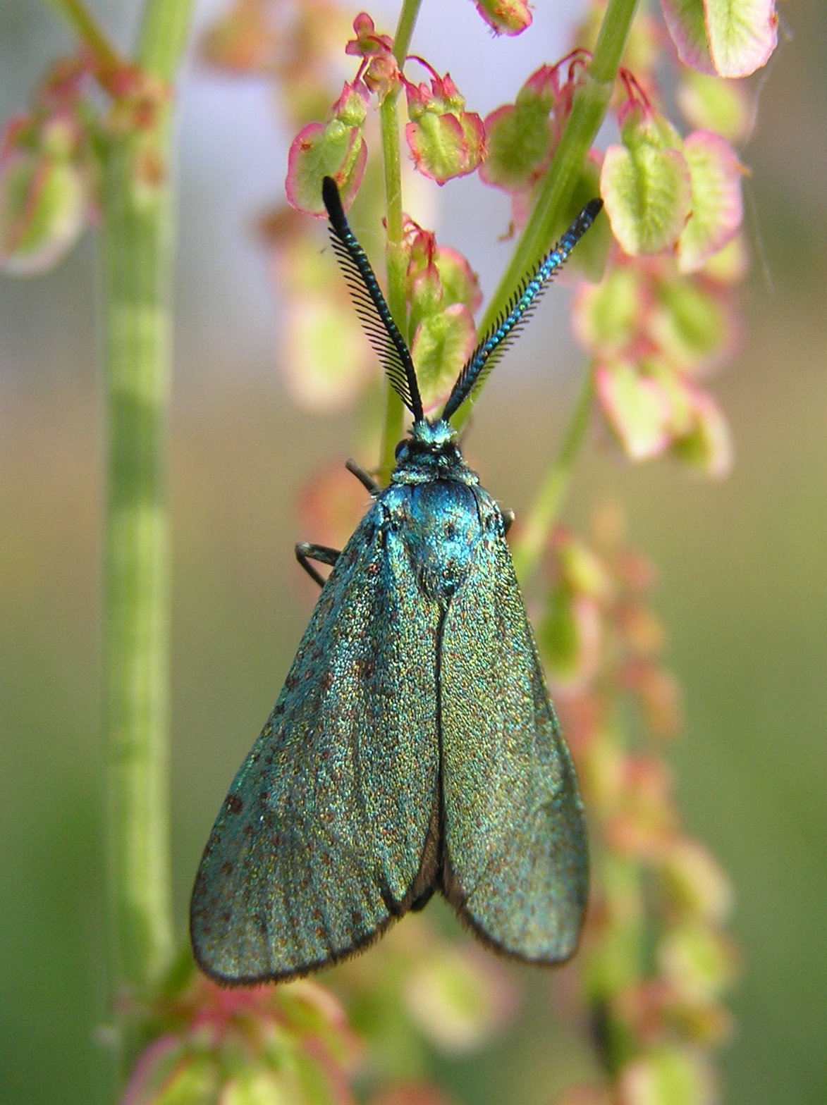 Lśniak szmaragdek, Adscita statices (Procris statices) na Szczawiu zwyczajnym, Rumex acetosa, Białowieża, Polska